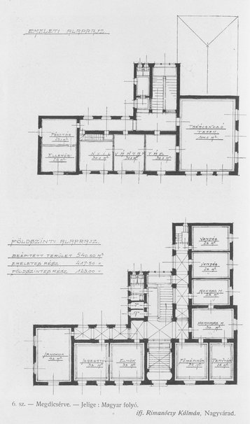 A nagyváradi Berettyó vízszabályozó és ármentesítő társulat székházának meg nem valósult pályaterve, készítette ifj. Rimanóczy Kálmán